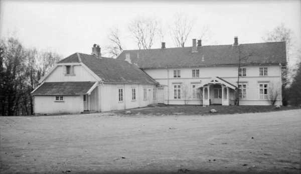 Hovedhuset på Østre Sogn gård, 1938